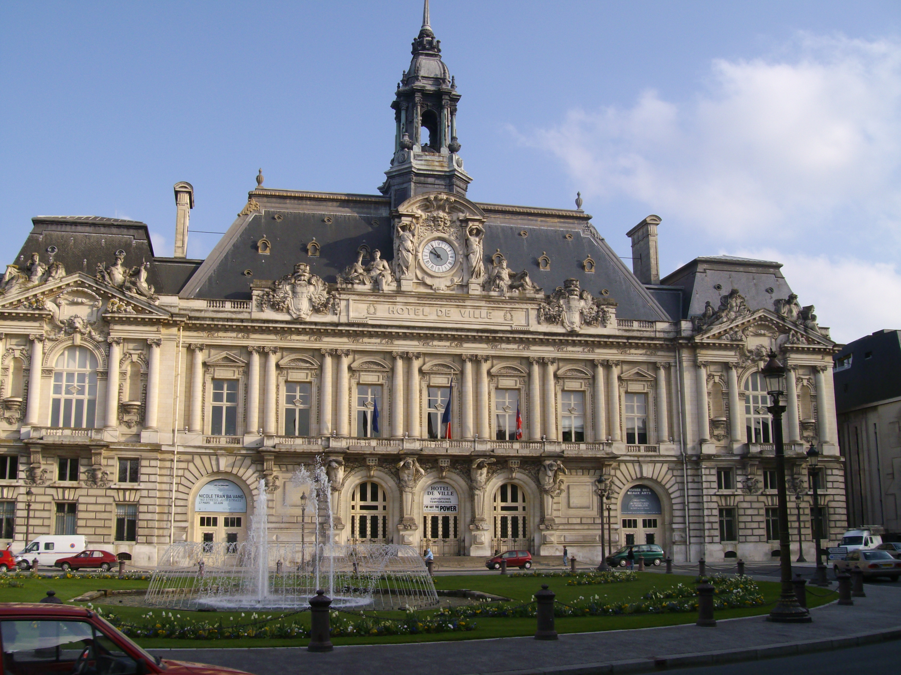 Hôtel de ville de Tours